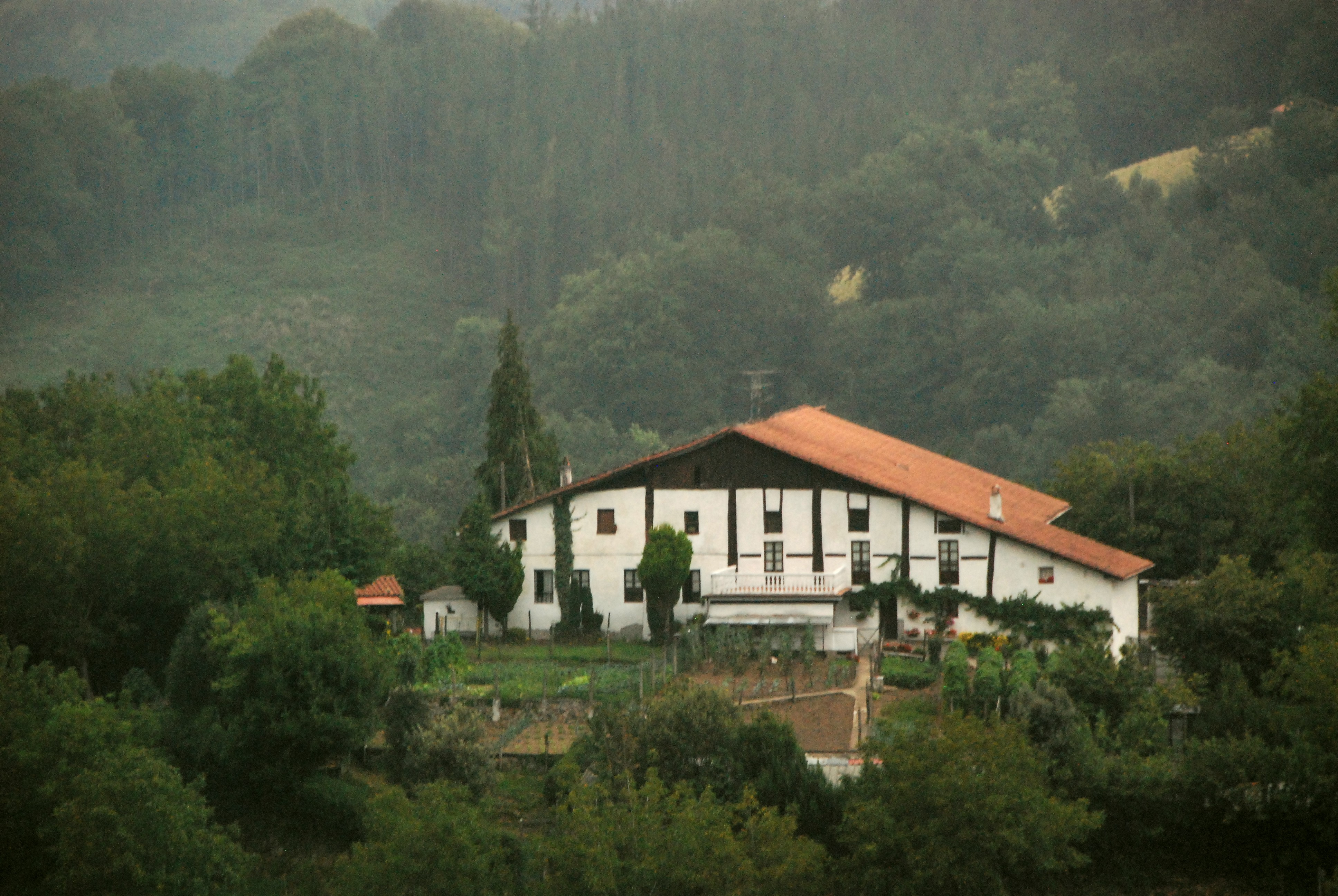 Zuaznabar Haundi baserria